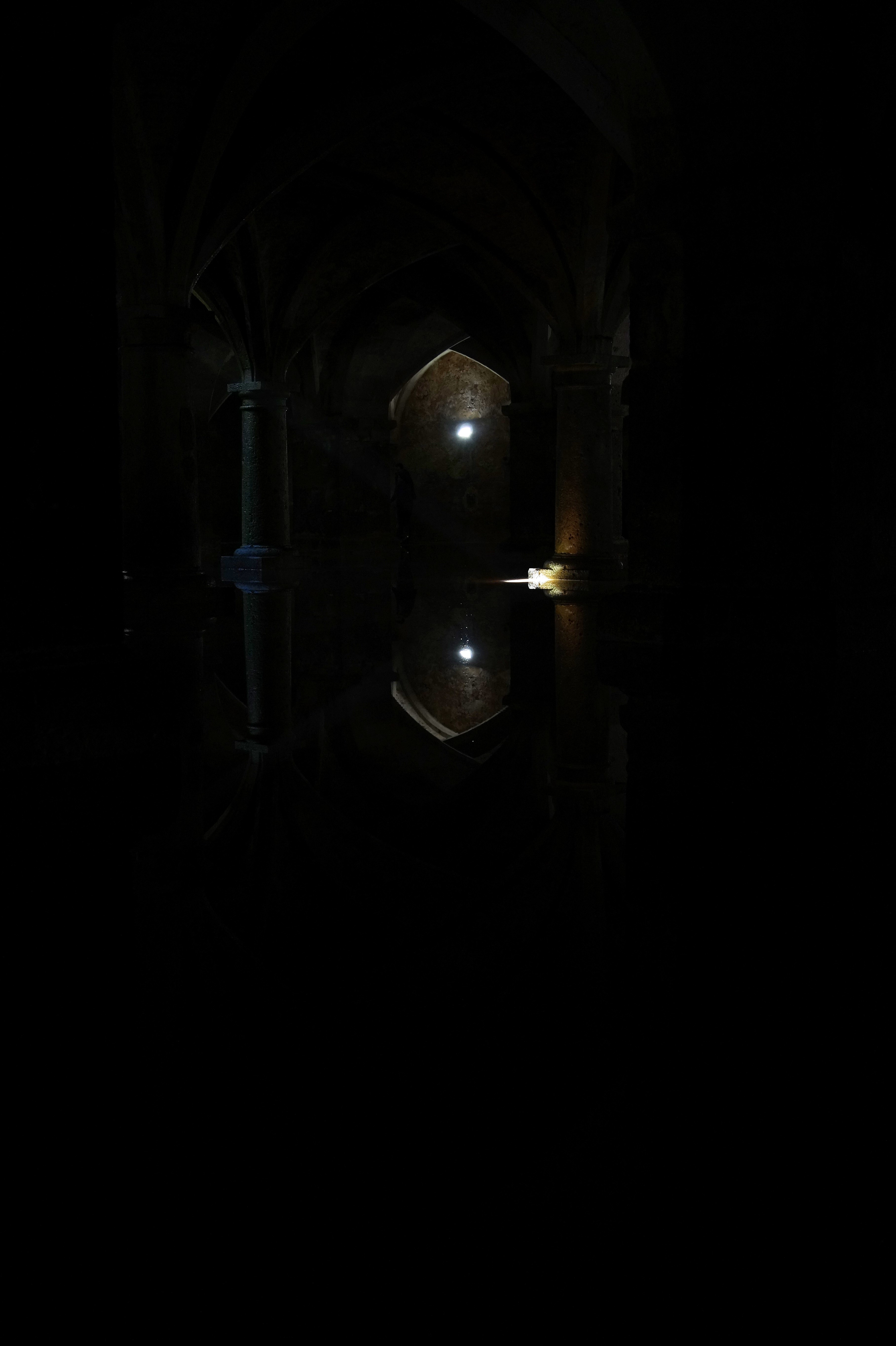 Cisterna dentro de la ciudadela construida por los ocupantes portugueses de El Jadida, Marruecos.